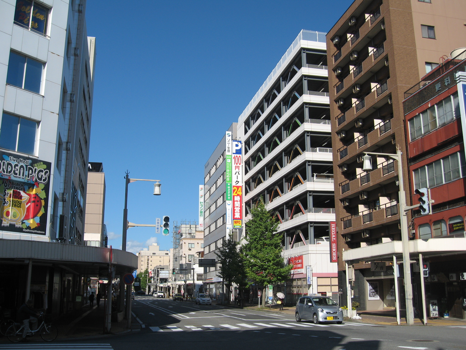 新潟県新潟市中央区。東堀通6番町の画像。